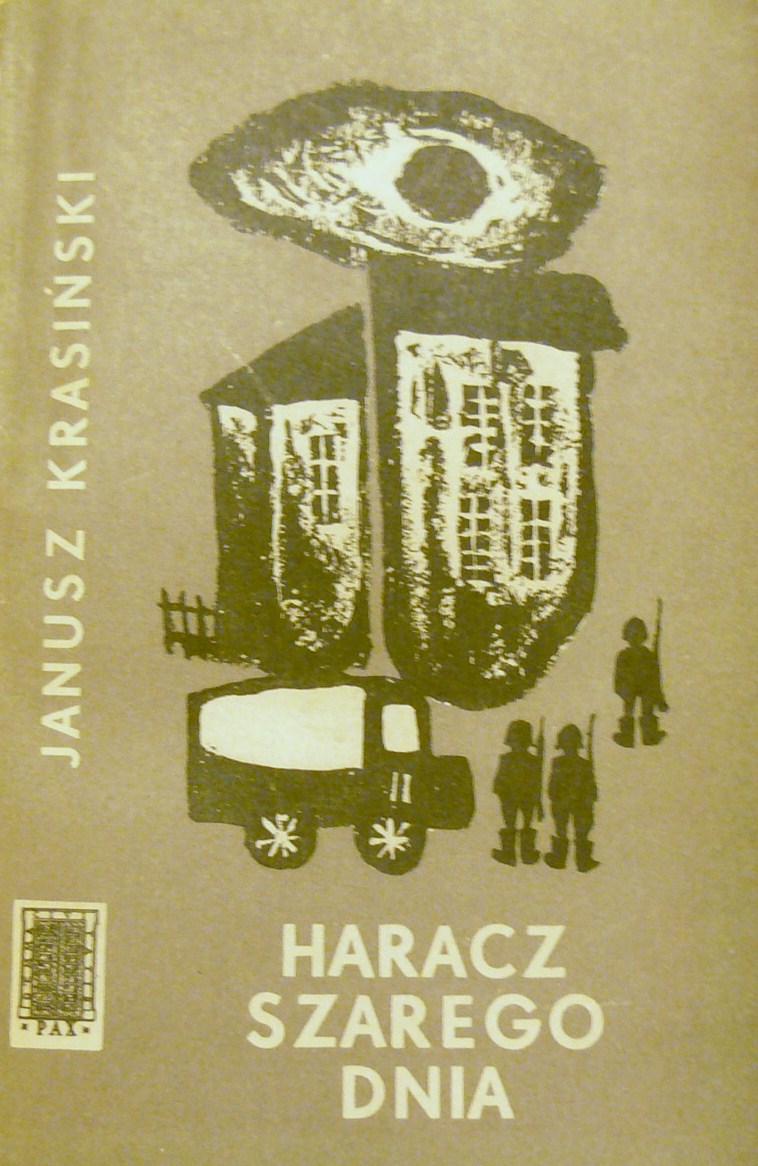 Okładka - Janusz Krasiński, Haracz szarego dnia. PAX, 1959.